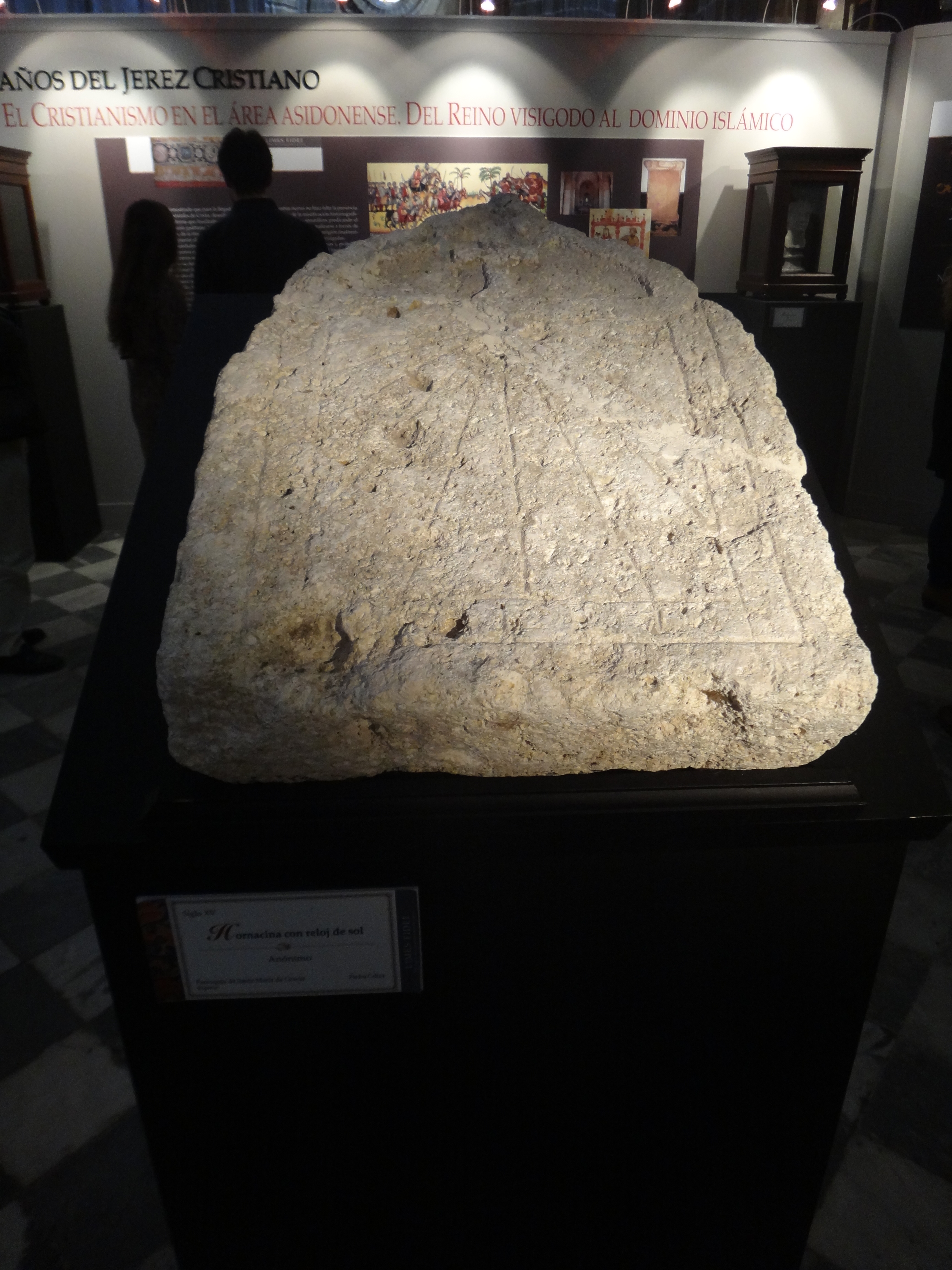 Exposición 'Limes Fidei. 750 años de cristianismo en Jerez' en la Catedral de Jerez de la Frontera